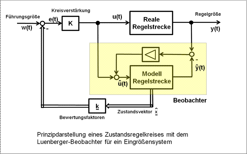 Prinzipbild eines Zustandsregelkreises mit Beobachter